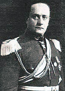 General Arturo Puga (Chile)